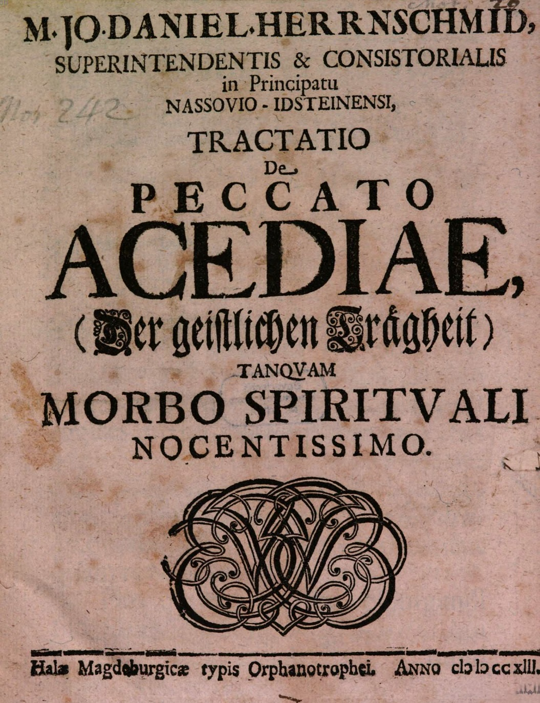 Johann Daniel Herrnschmidt: Tractatio de peccato acediae (der geistlichen Trägheit). Halle 1713, Titelblatt